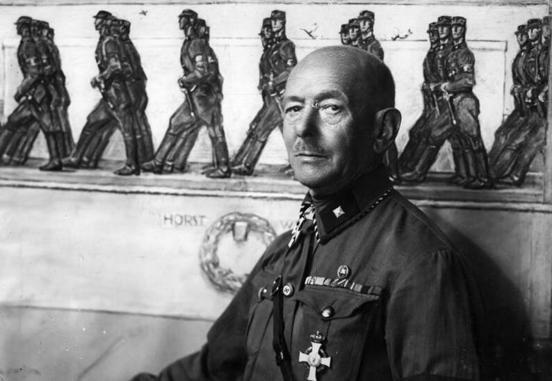 Ludwig Dettmann Scherl: Das Erlebnis deutscher Künstler im Weltkrieg. Professor Ludwig Dettmann schuf im Weltkriege die bekannten Bildnisse Hindenburgs und Ludendorffs, ebenso wie von ihm die kraftvollen Bilder zu Bloems Buch: "Weltbrand" stammen. Dem gewaltigen Geschehen des neuen Deutschland hat er an der Schwelle der siebziger Jahre stehende Meister deutscher Bildniskunst künstlerische Gestaltung gegeben. [Porträt Ludwig Dettmann in SA-Hemd] Abgebildete Personen: Dettmann, Ludwig Prof. Dr.: Maler, Deutschland (GND 116086483)